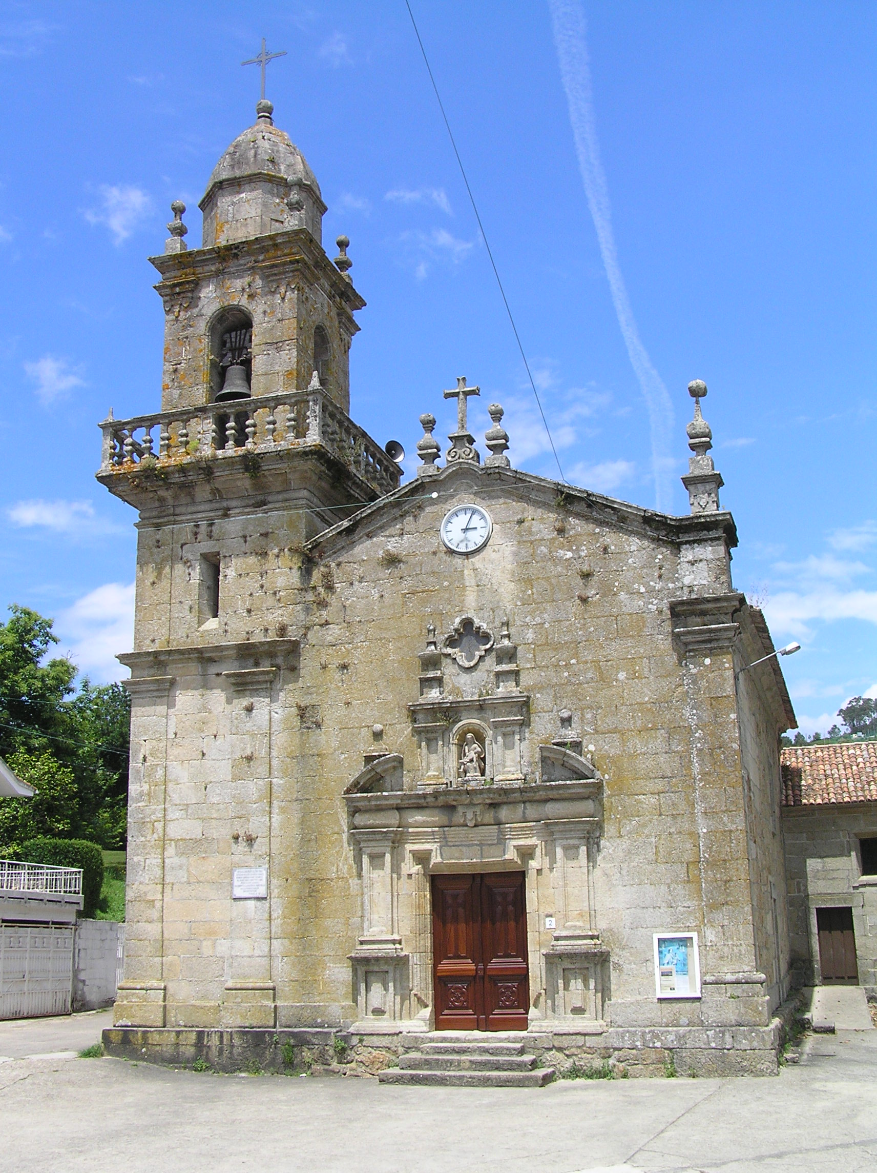 Capela de Nosa Señora das Angustias. Church in Nigran, Pontevedra, Spain.